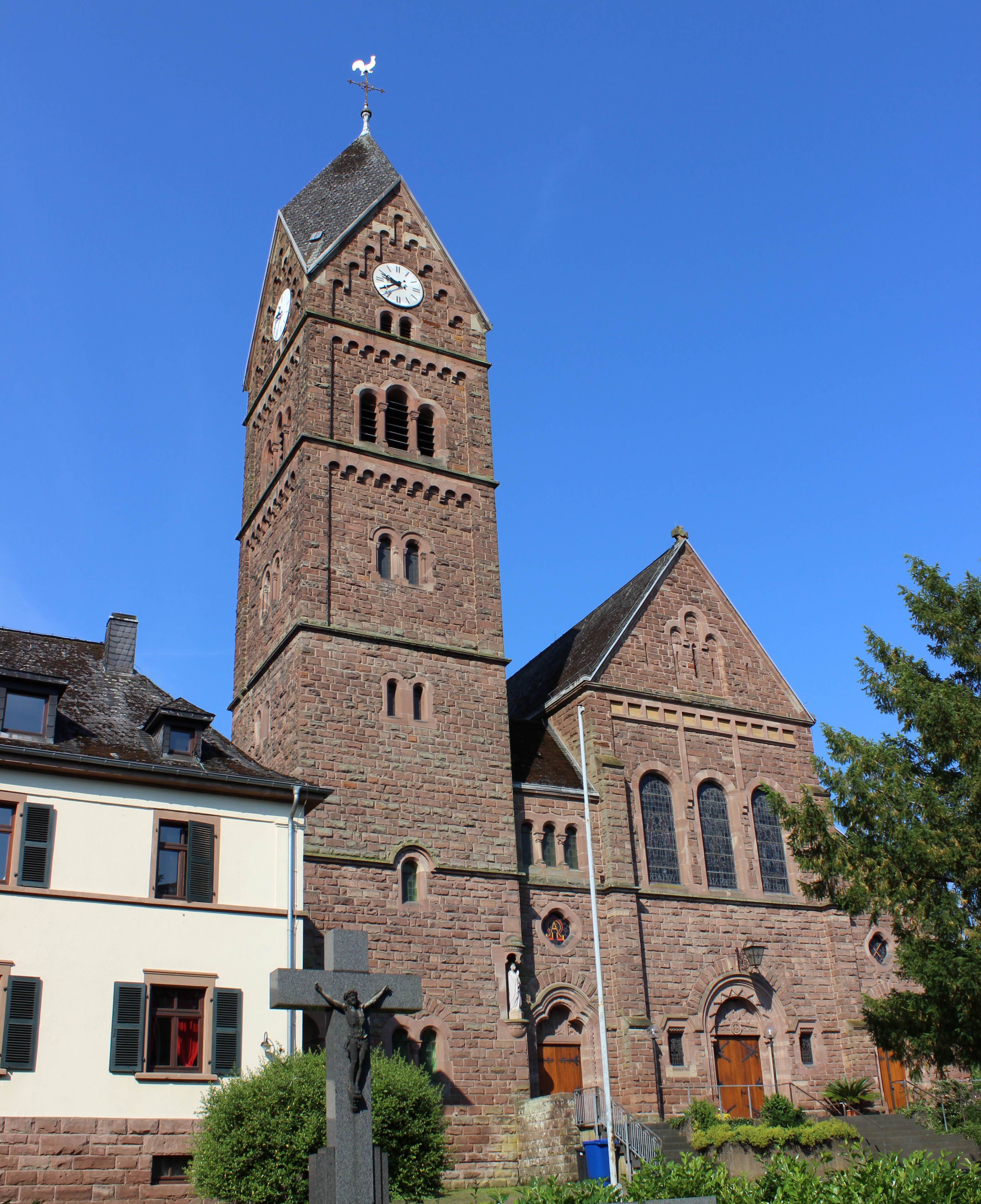 Die katholische Pfarrkirche St. Mauritius in Fremersdorf, einem Ortsteil der Gemeinde Rehlingen-Siersburg, Landkreis Saarlouis, Saarland